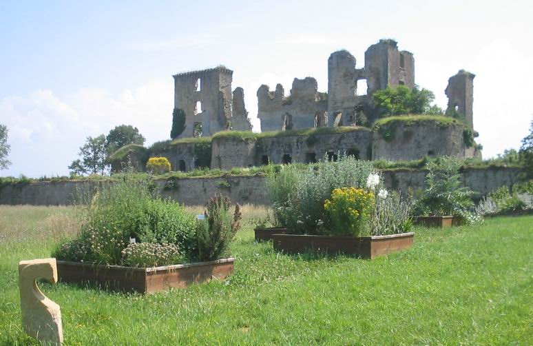 Lagarde (Ariège, Midi-Pyrénées, France) : Le château.